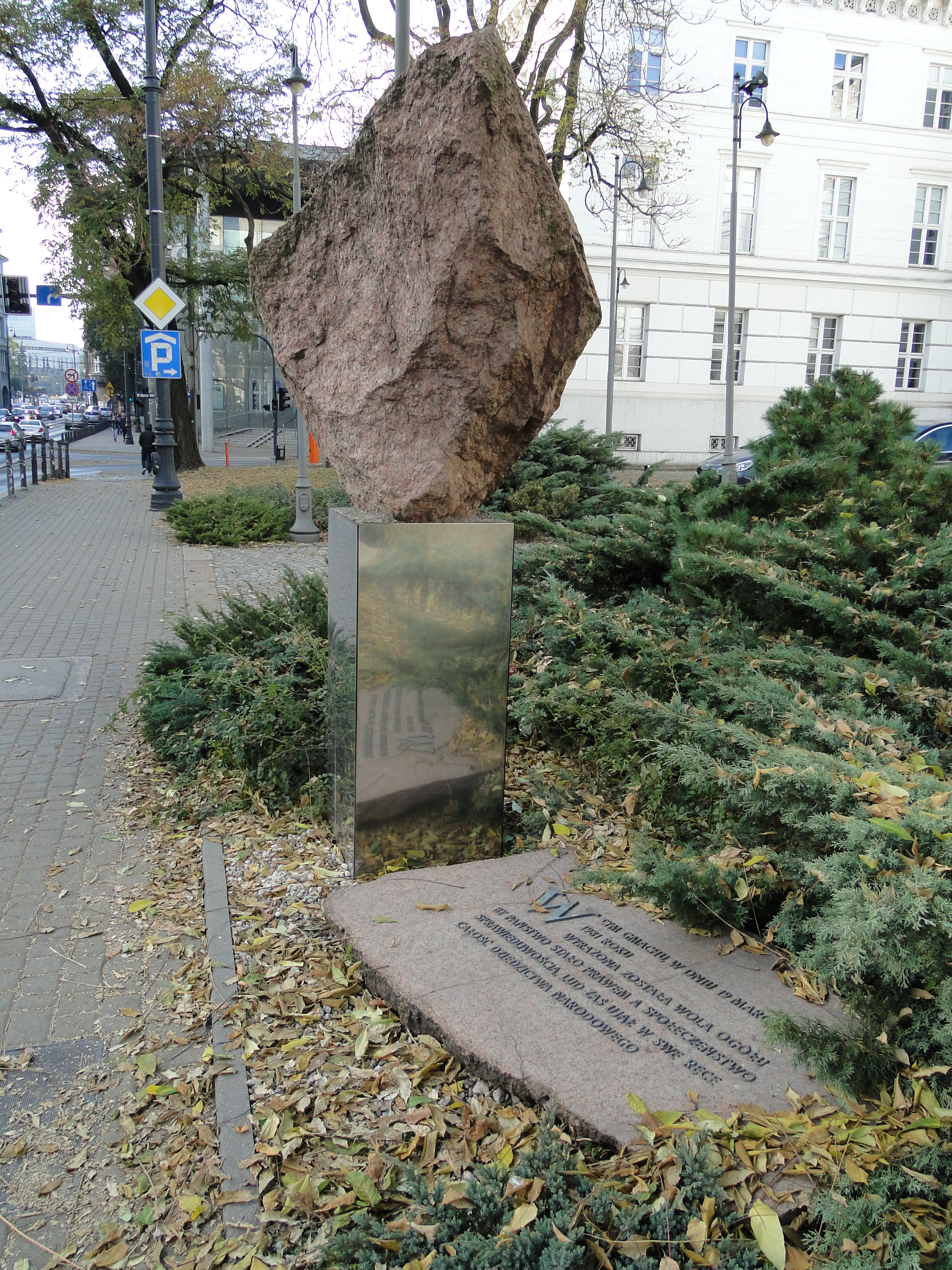 Pomnik upamiętniający wydarzenia bydgoskie - 19.03.1981